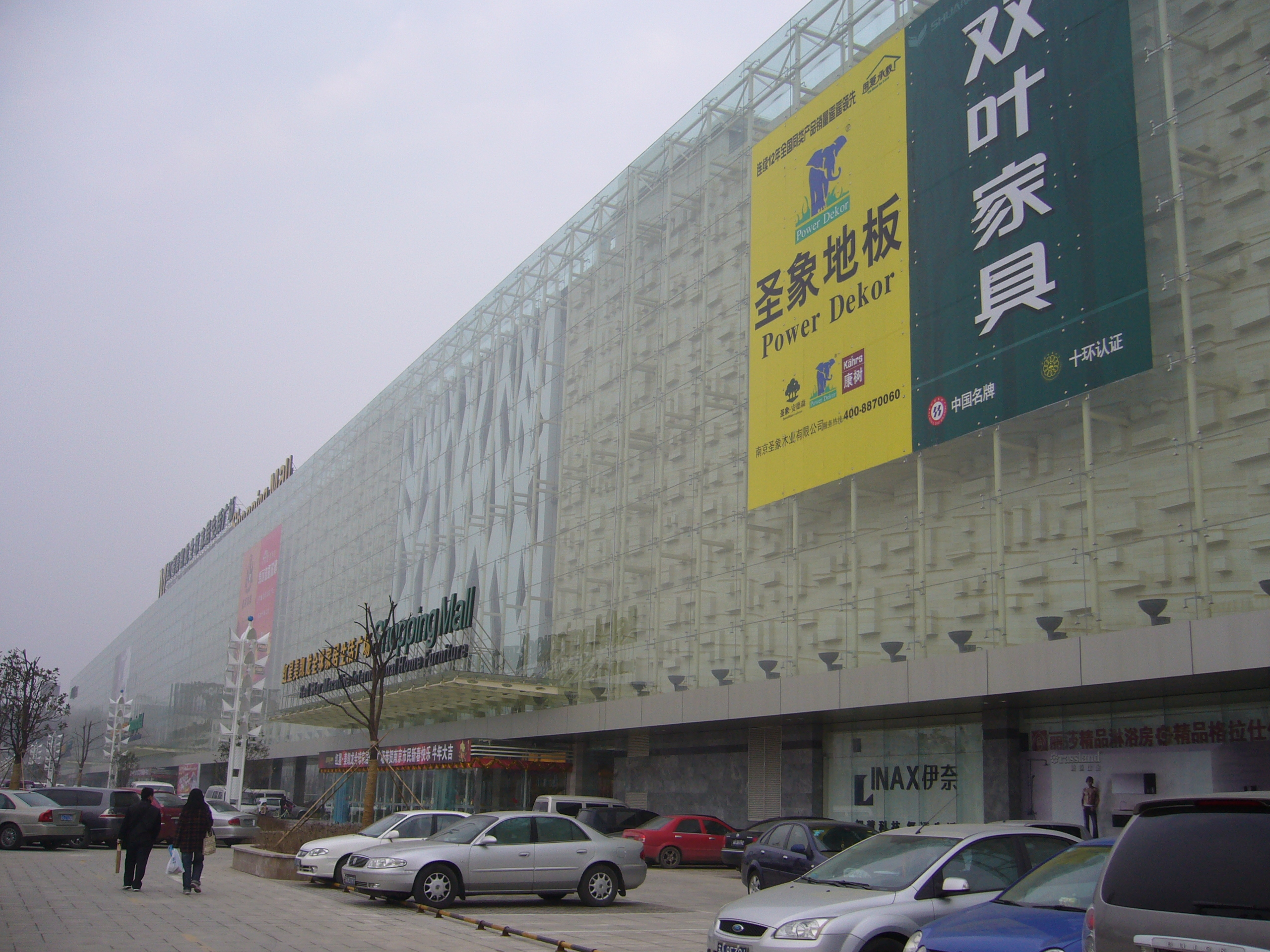 红星美凯龙家具广场